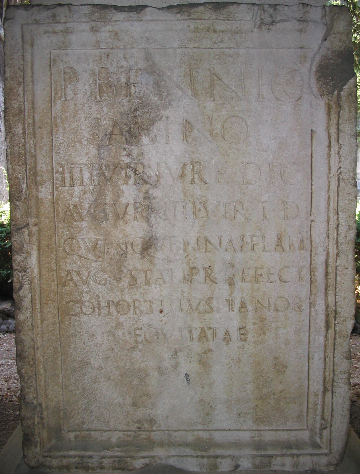 Inscription latine d’époque romaine retrouvée à Solin (Salonae) en 1884 et conservée au musée archéologique de Split. Inscription, sur dé de pierre, probablement base de statue, en l’honneur du chevalier romain Publius Bennius Sabinus. Texte latin : « P(ublio) Bennio / Sabino / IIIIuir(o) iure dic(undo), auguri, IIIIuir(o) i(ure) d(icundo) / quinquennal(i), flam(ini) / Augustali, praefect(o) /cohort(is) II Lusitanor(um) / equitatae. » Référence CIL III, 8733.Unknown ancient roman inscription from solin, now in the archaeological museum of split, honoring the roman knight publius bennius sabinus.